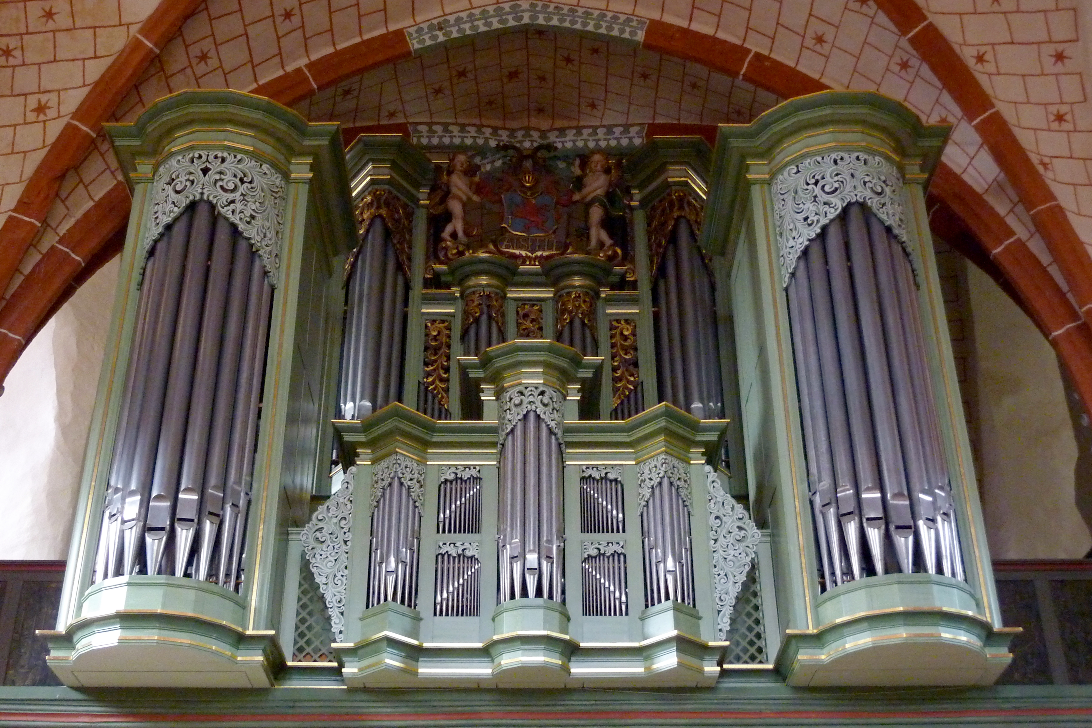 Evangelische Walpurgiskirche in Alsfeld im Vogelsbergkreis (Hessen), Orgel von 1982 mit barockem Orgelprospekt